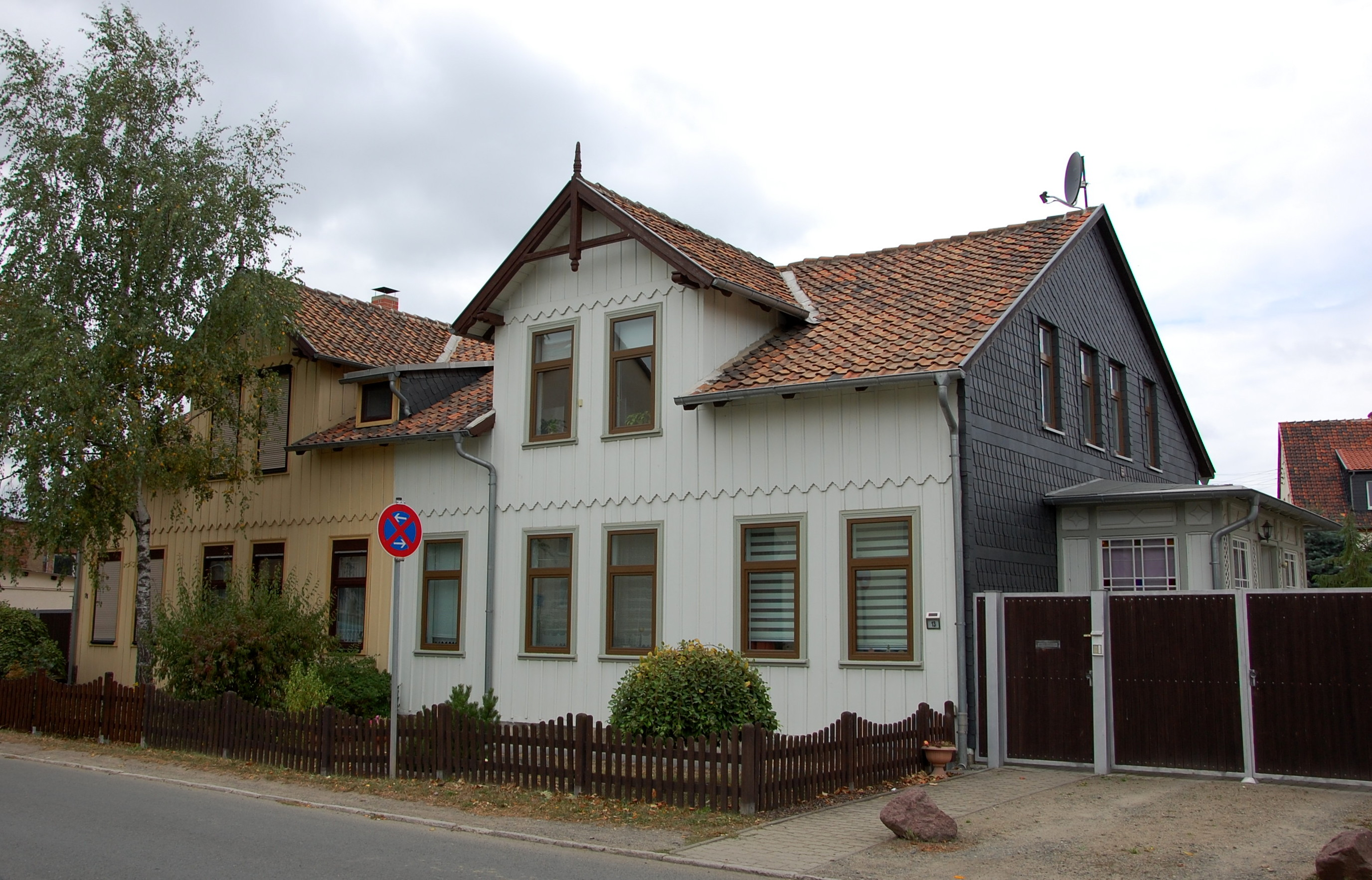 Haus Ditfurter Weg 11, 13 in Quedlinburg